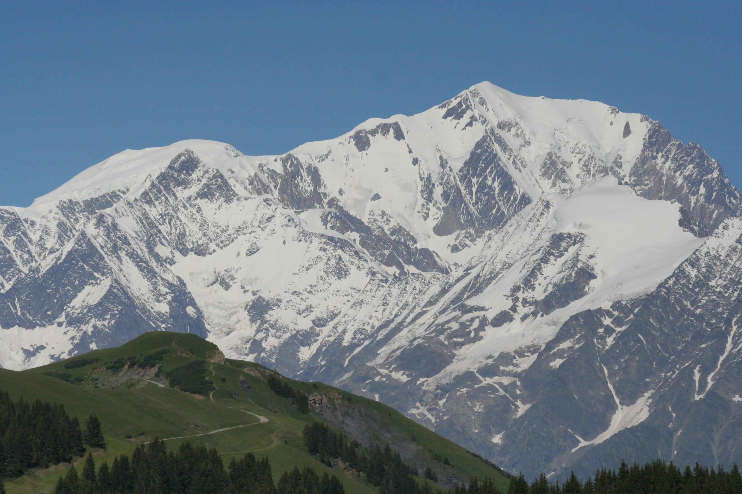 Le massif du Mont Blanc, versant surmontant le Val Montjoie. Au premier plan, le Mont Clocher (1976 m), avec une croix blanche érigée à son sommet. Photos prise des Saisies (73).